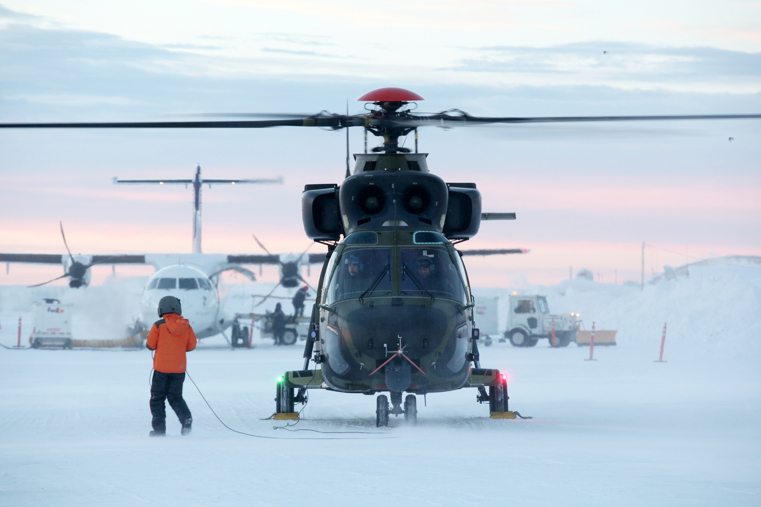 수리온 알래스카 저온 테스트